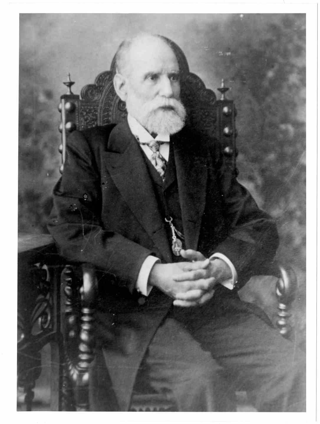 Domingos Dias Machado enquanto Presidente da Câmara Municipal de Mafra